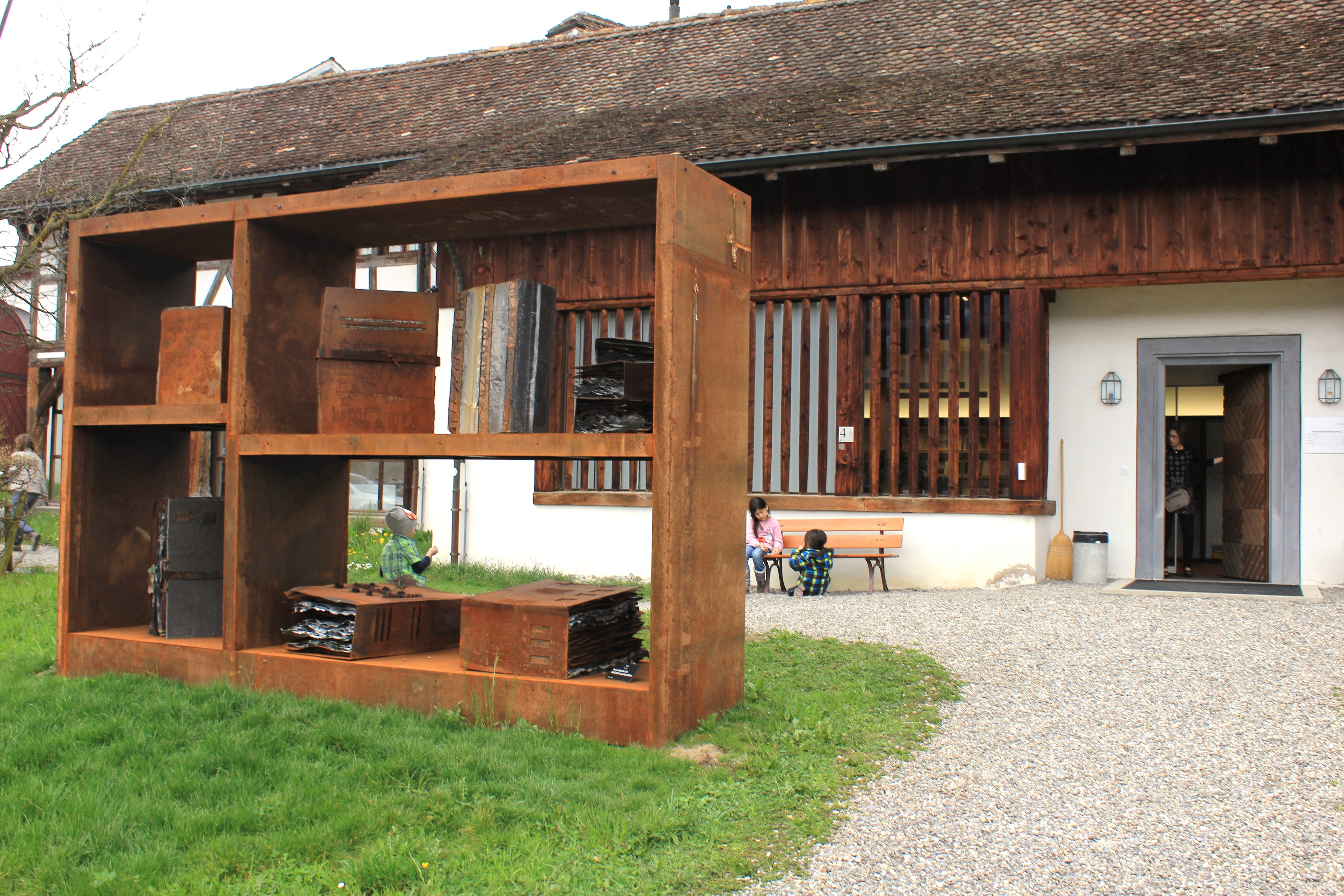 Aussenansicht der Kantonsbibliothek in der Ital-Reding-Hofstatt in Schwyz mit der Installation "Dokumente" (2015) von Sibylle Schindler Rickenbacher.